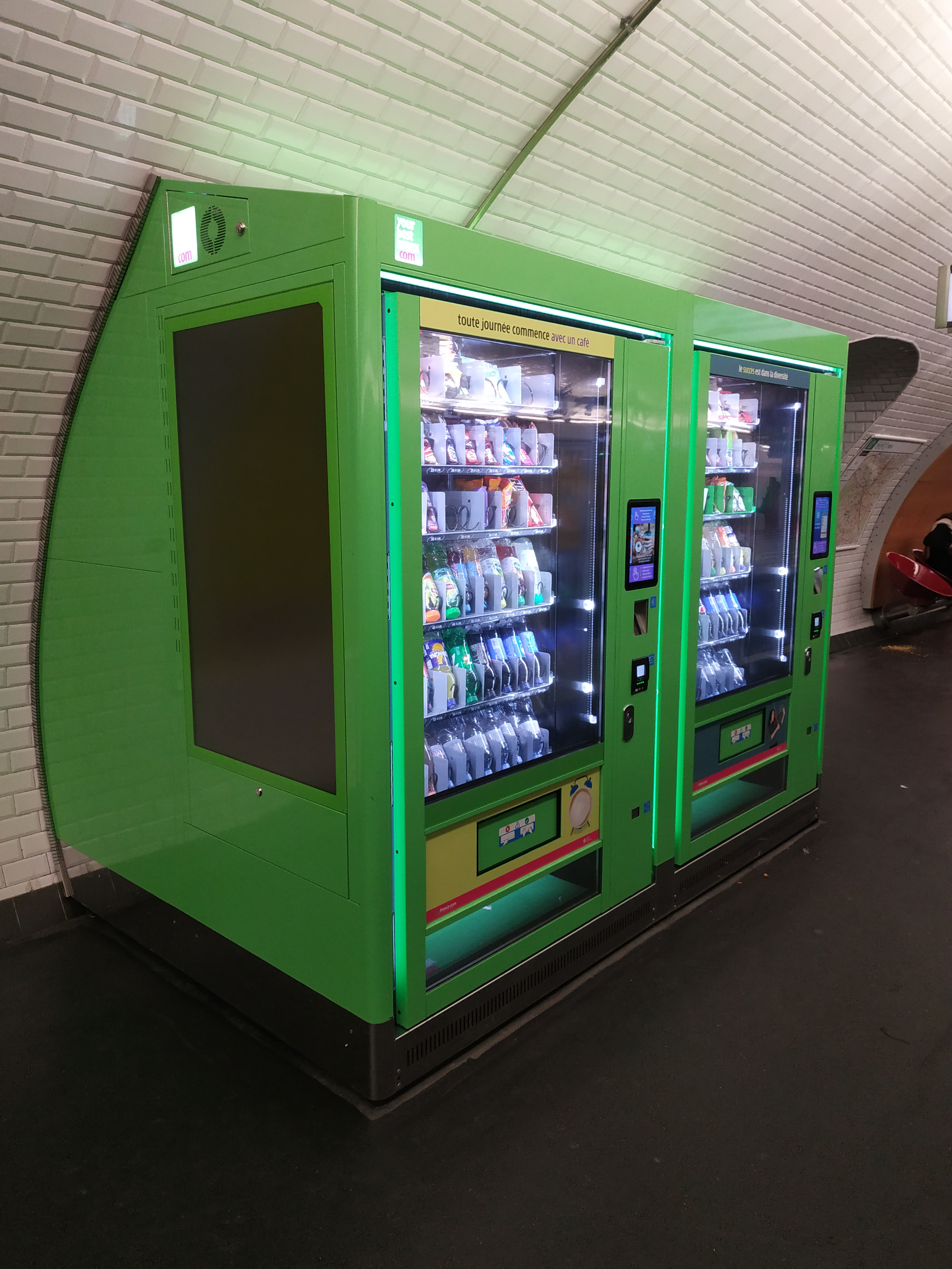 Distributeurs automatiques IVS dans le métro RATP. Ces machines viennent remplacer celles de Selecta et ses distributeurs gris-rouge, qui a perdu l'appel d'offres RATP en 2019